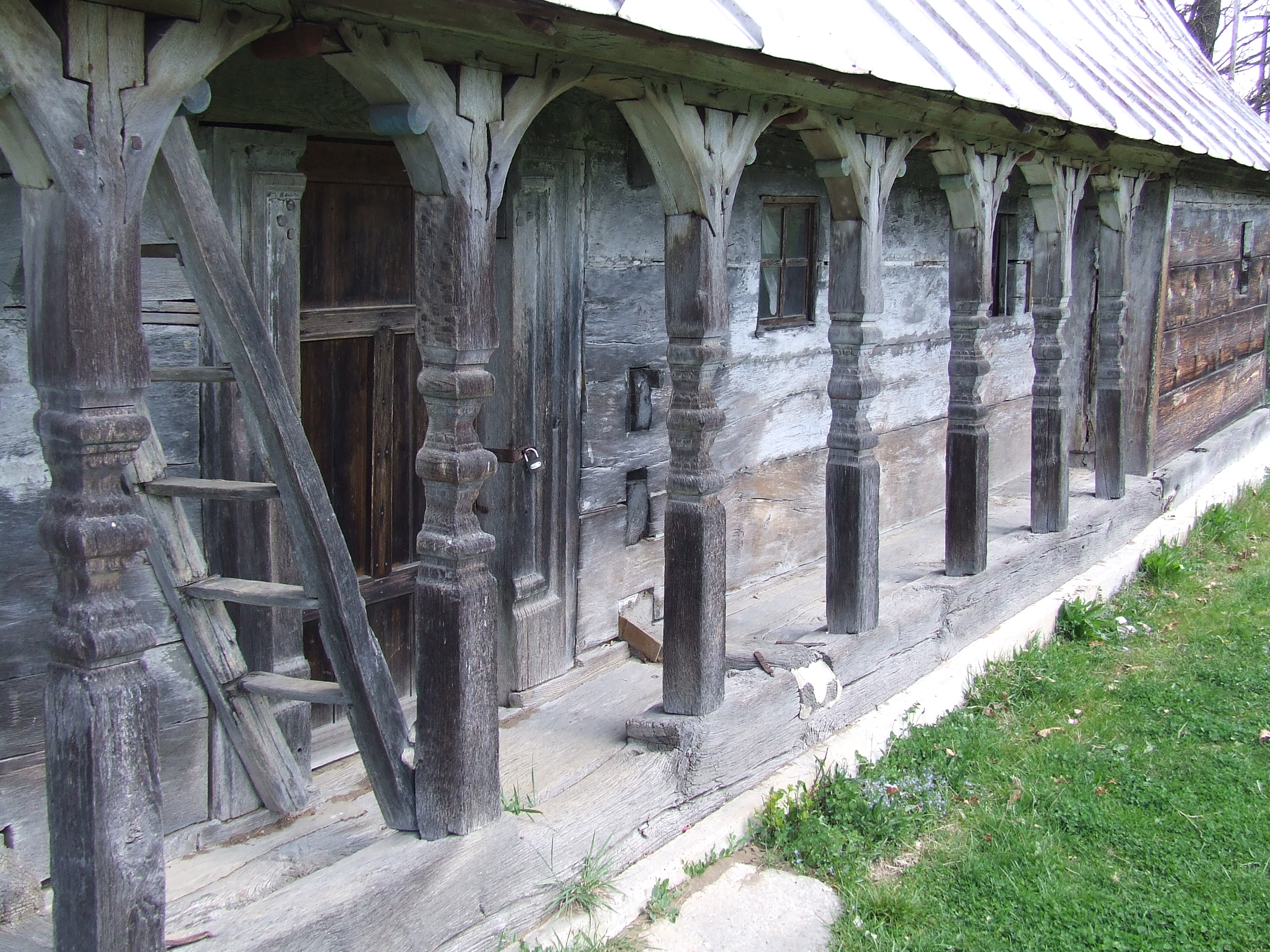 Prispa bisericii de lemn din Răstolţu Deşert, judeţul Sălaj, 2007.